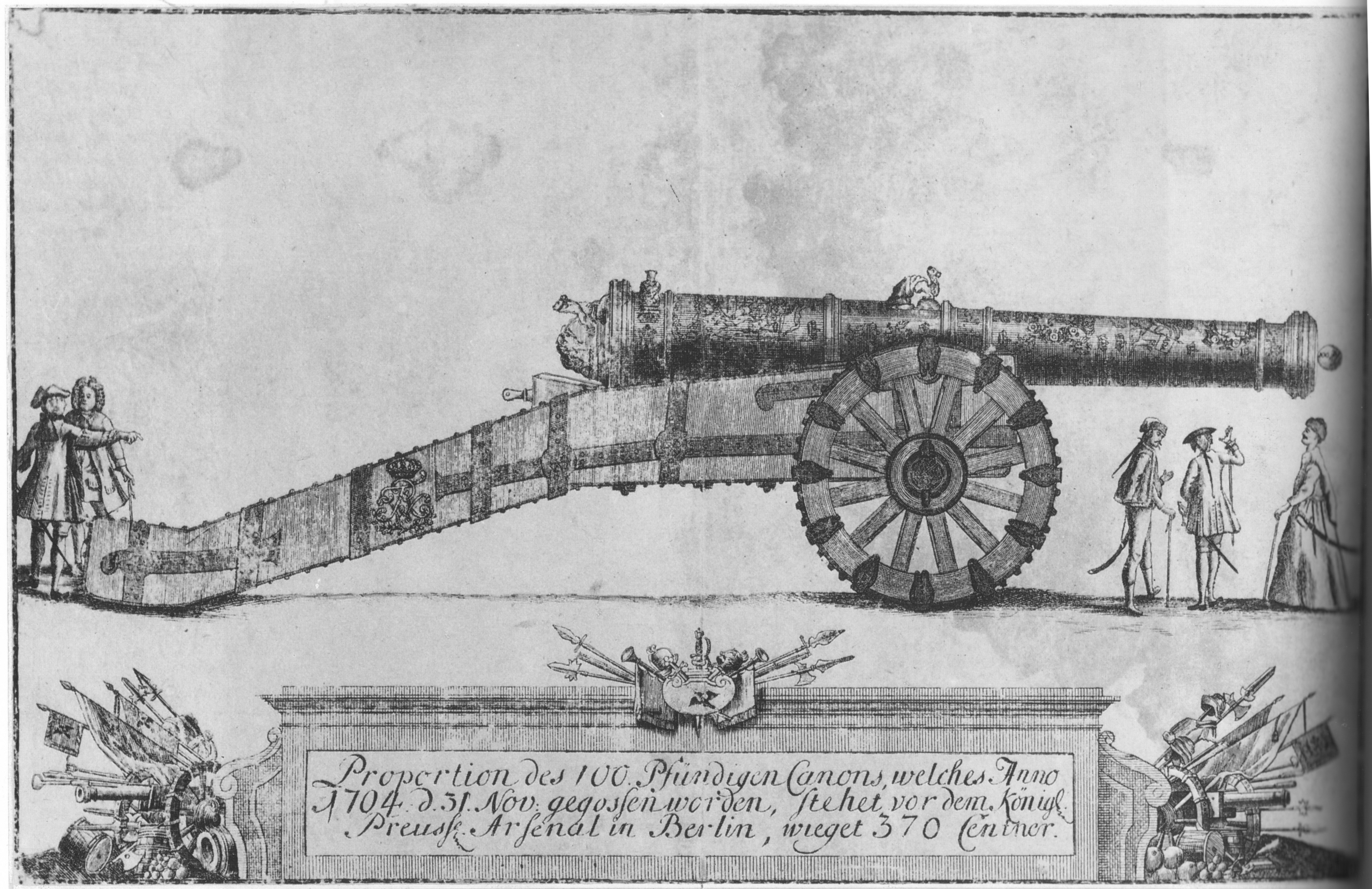 Die preußische Riesenkanone Asia